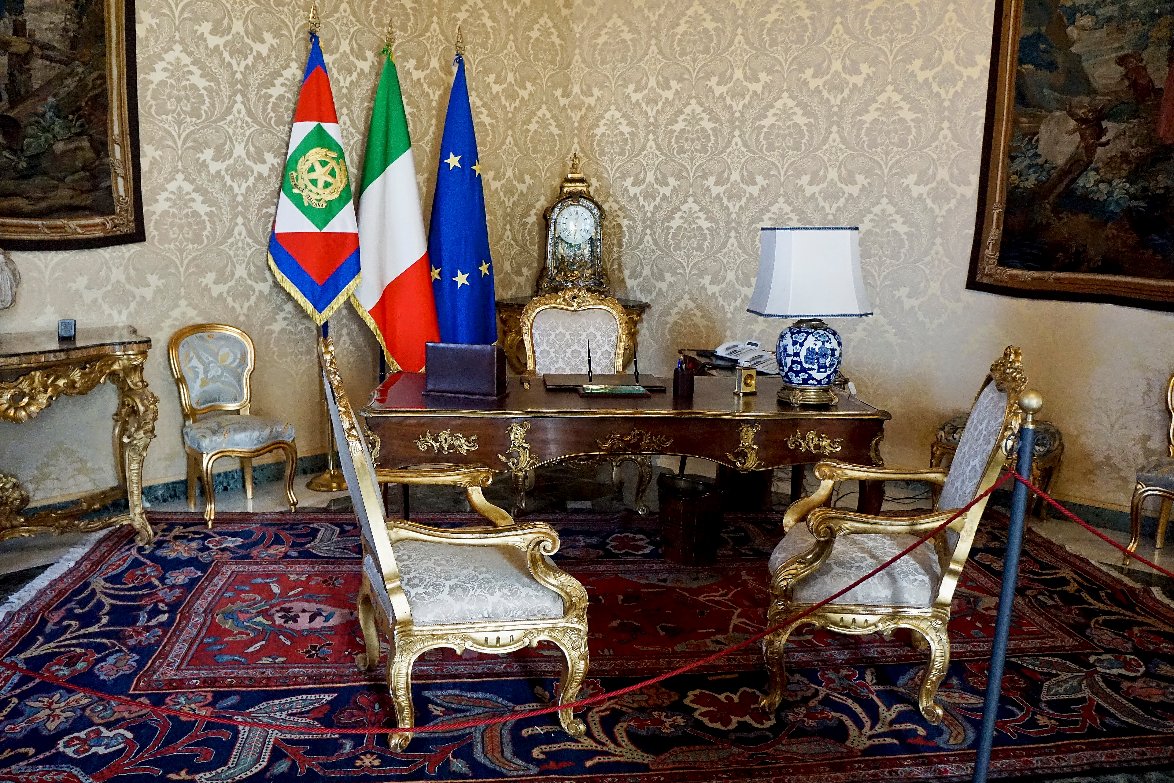 aDSC03656